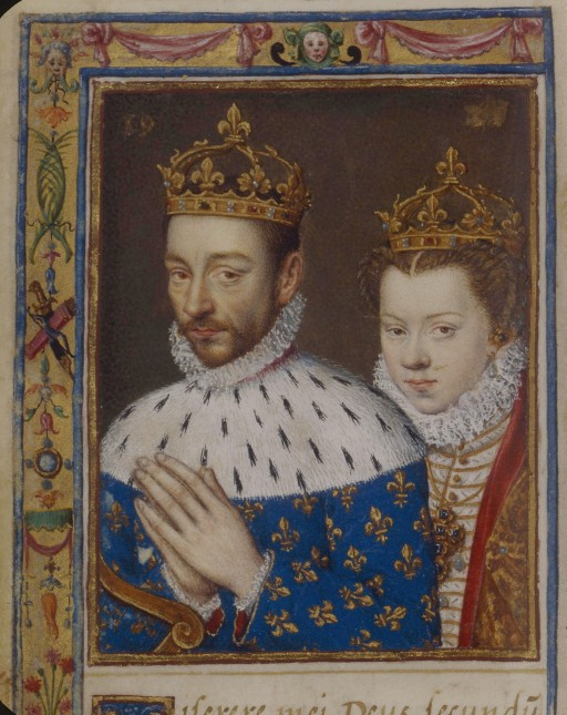 Miniatura estratta da un libro di preghiere di Caterina de' Medici, raffigurante Carlo IX di Francia ed Elisabetta d'Asburgo, sua moglie.